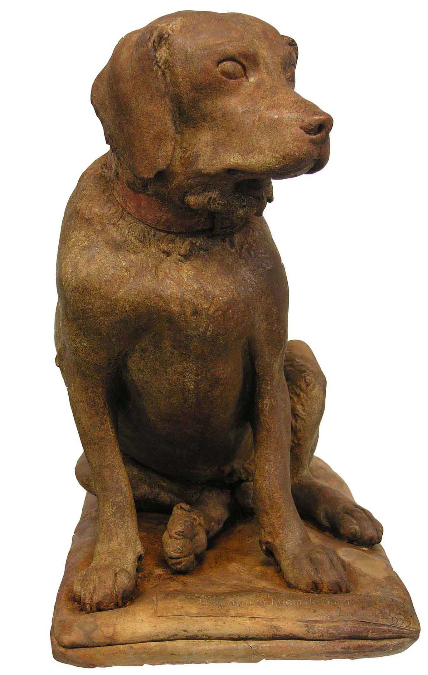 La statua del cane Tago, opera del forlivese Luigi Acquisti.